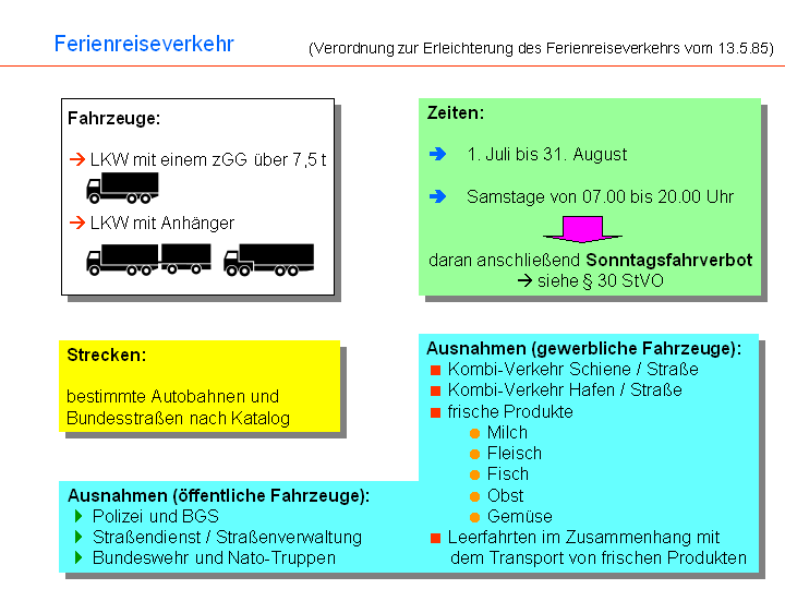 Grafik Fahrverbot (Ferienreise)